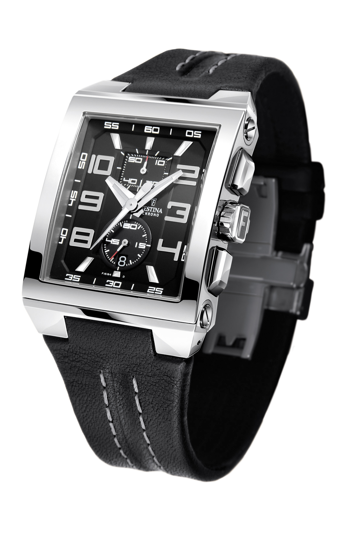 Eine Uhr von Festina